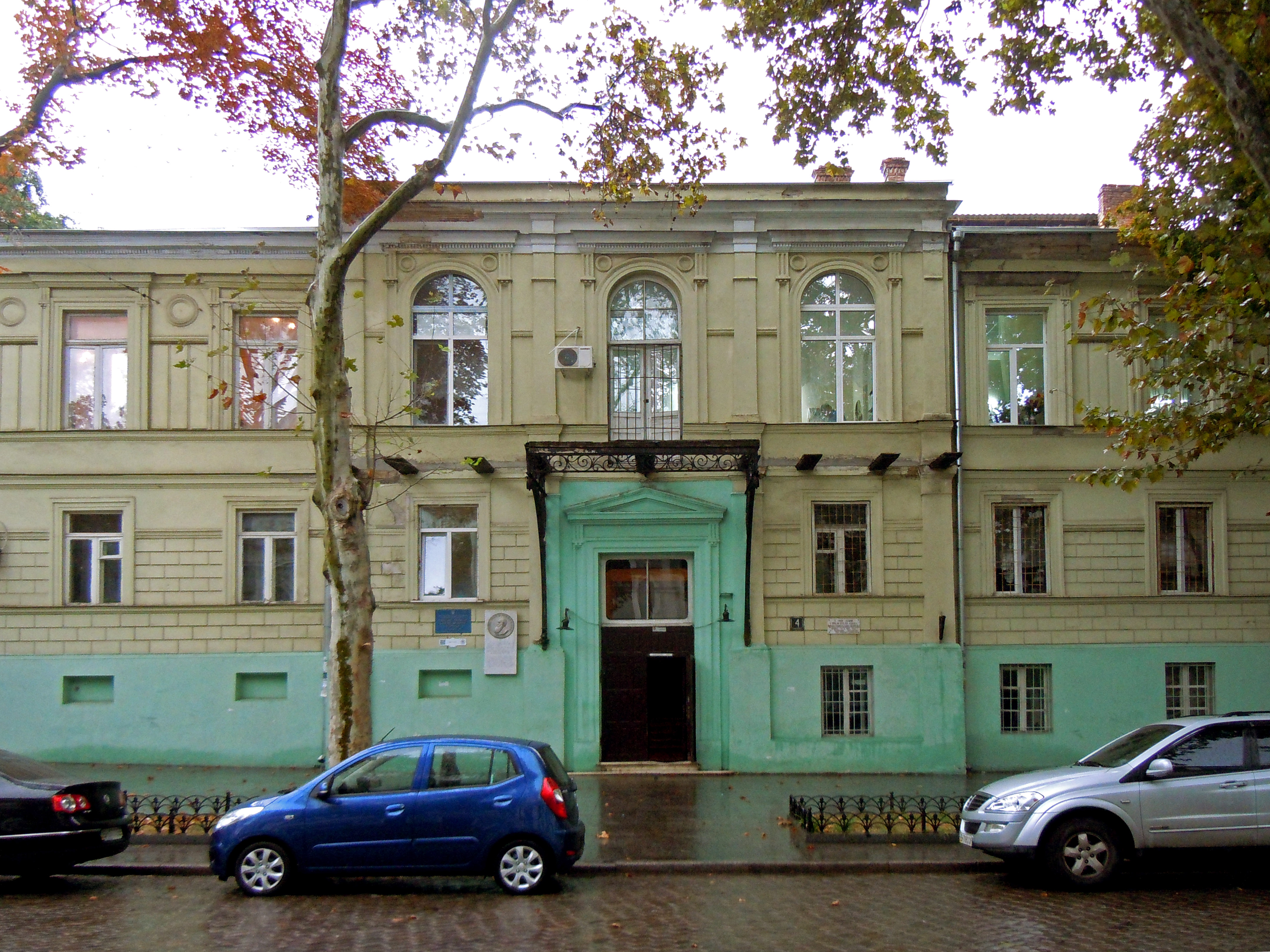 Будинок житловий Маразлі, у якому жив Г.Г. Маразлі – одеський міський голова, Одеса, Пушкінська вул., 4/8 (ріг вулиць Пушкінської, 4 та Дерибасівської, 8)